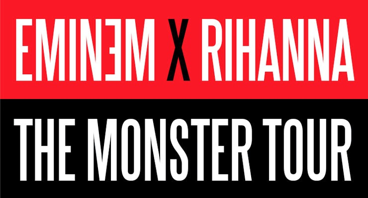 Logo del tour de RiRi y Emi.